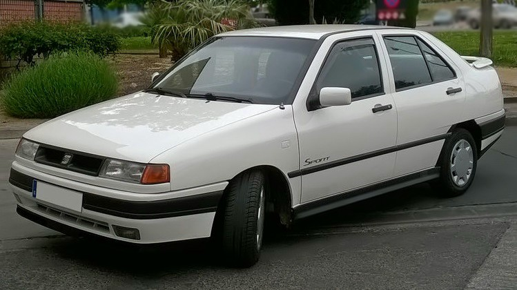 Fotografía realizada con el móvil de un SEAT Toledo Sport de 1992 con parte del Paquete opcional GT Sport.